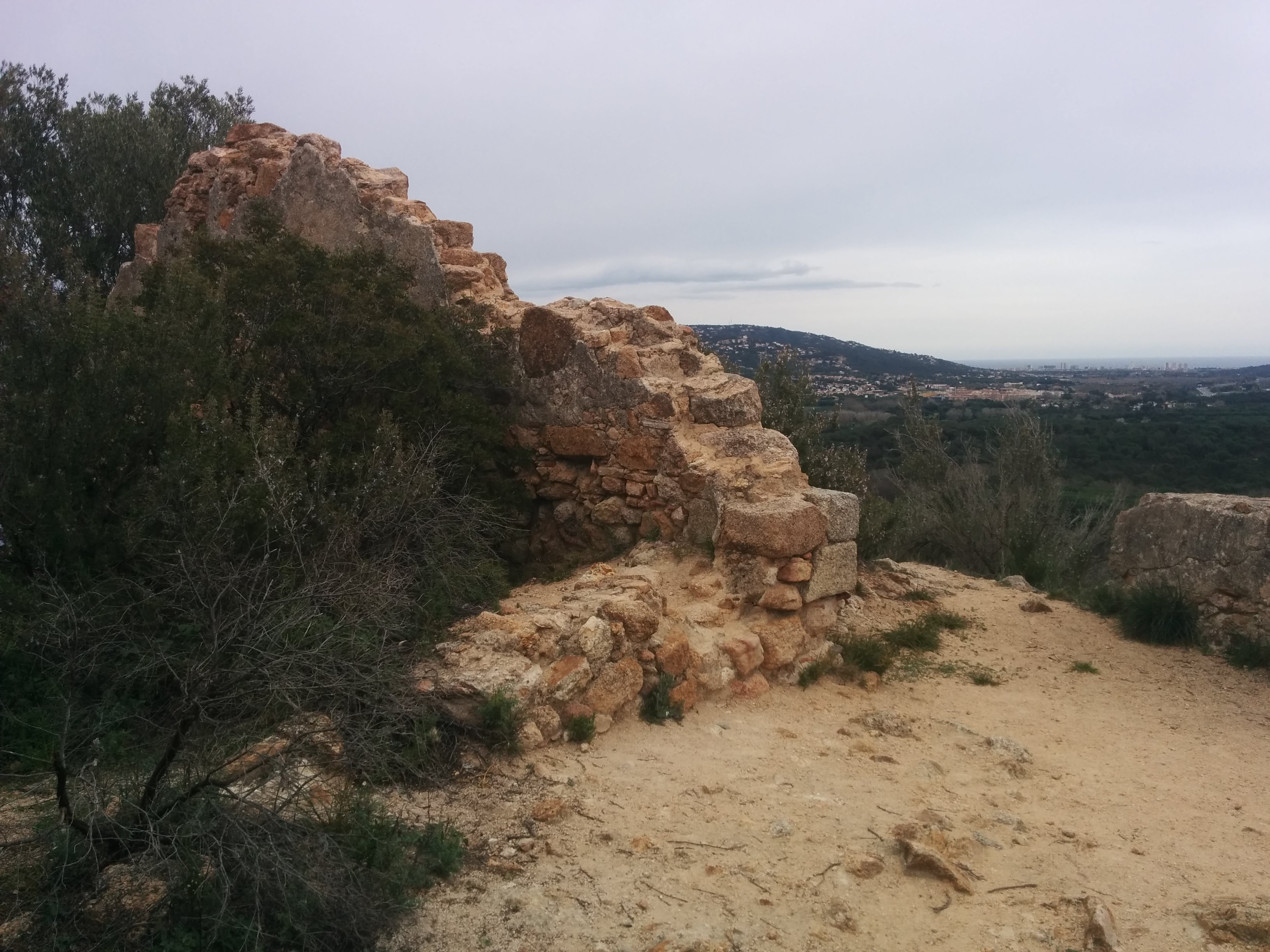 Castell de Solius (Santa Cristina d'Aro)